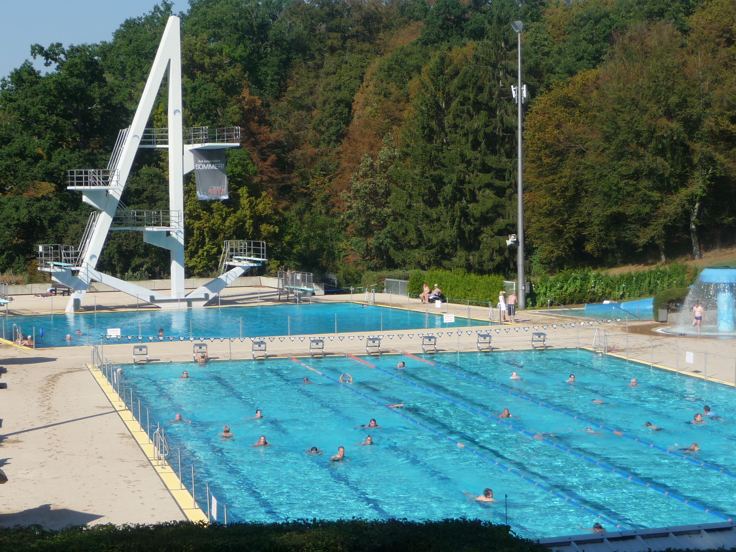 Badezentrum Sindelfingen – Sportschwimmbecken und Sprungturm mit Sprung- und Tauchbecken